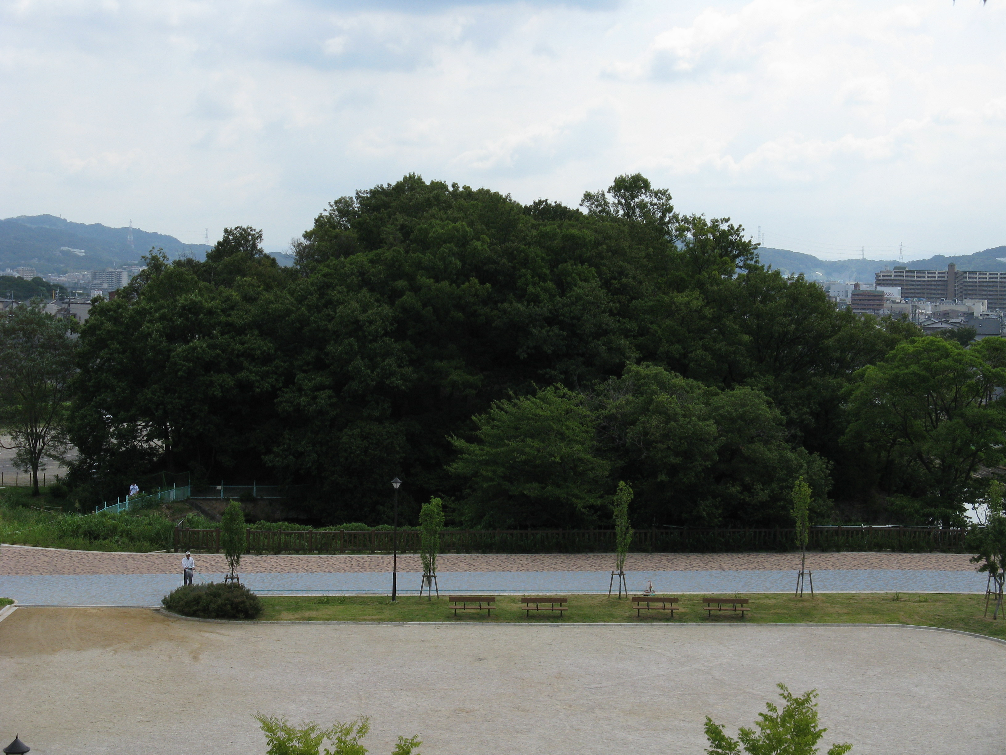 峯ヶ塚古墳